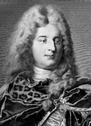 Karl Heinrich Graf von Hoym (1694-1736) Saxony's minister